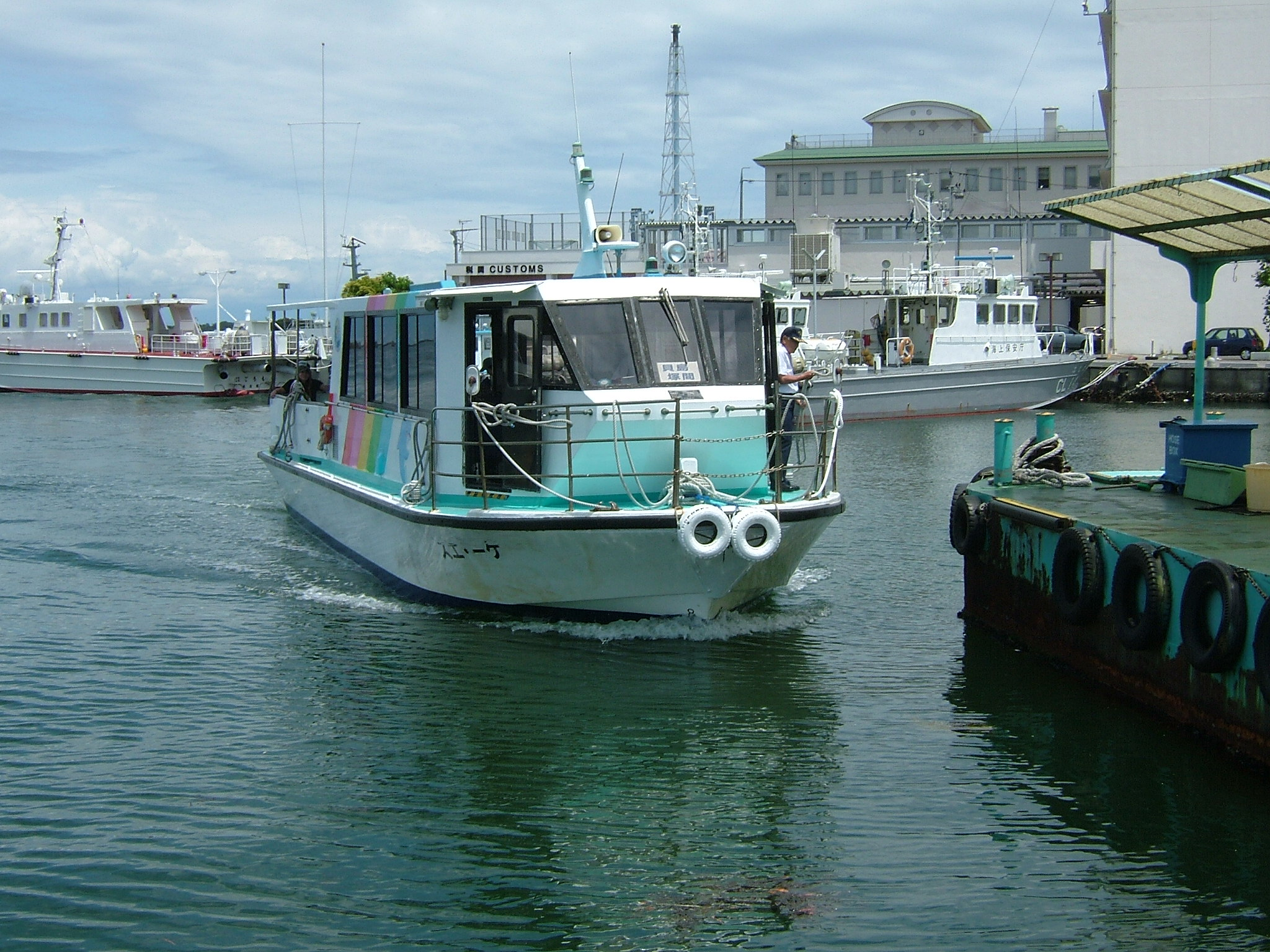 エスパルスドリームフェリー水上バス（日の出のりば）